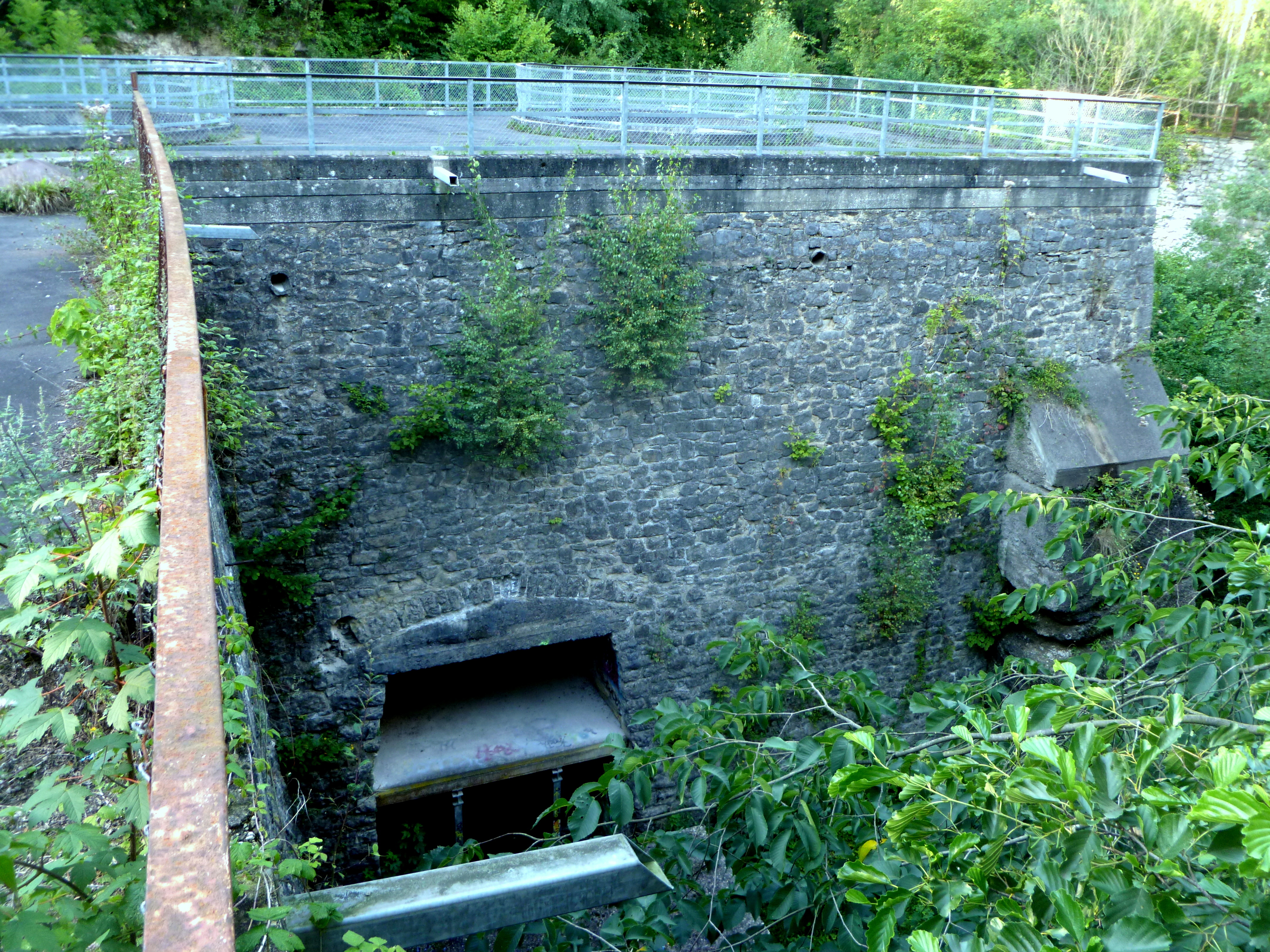 Trichterkalkofen Aachen-Walheim; Baudenkmal in Aachen-Walheim